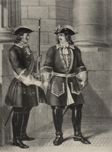 Рядовой и Офицер Лейб-Регимента, с 1727 по 1730 год. Данный рисунок был также использован для иллюстрирования статьи «Лейб-регимент» опубликованной в четырнадцатом томе «Военной энциклопедии», который был издан книгоиздательским товариществом Ивана Дмитриевича Сытина в 1914 году в столице Российской империи городе Санкт-Петербурге. Подробное описание к этой картинке можно прочесть в указанной выше статье на сайте Русской Викитеки.